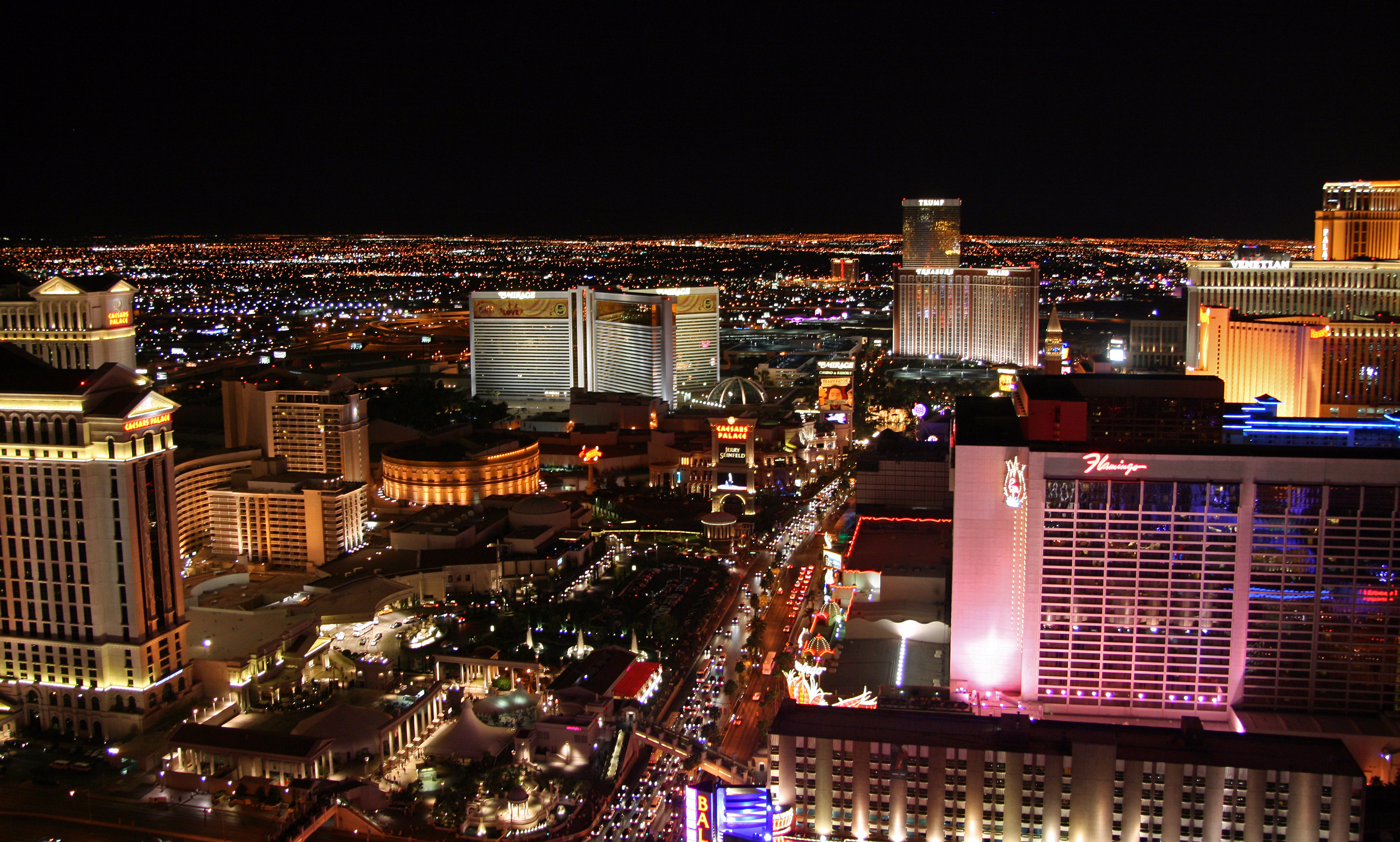 Vue Nord depuis la tour Eiffel de l'hotel Paris Las Vegas, Las Vegas, Nevada